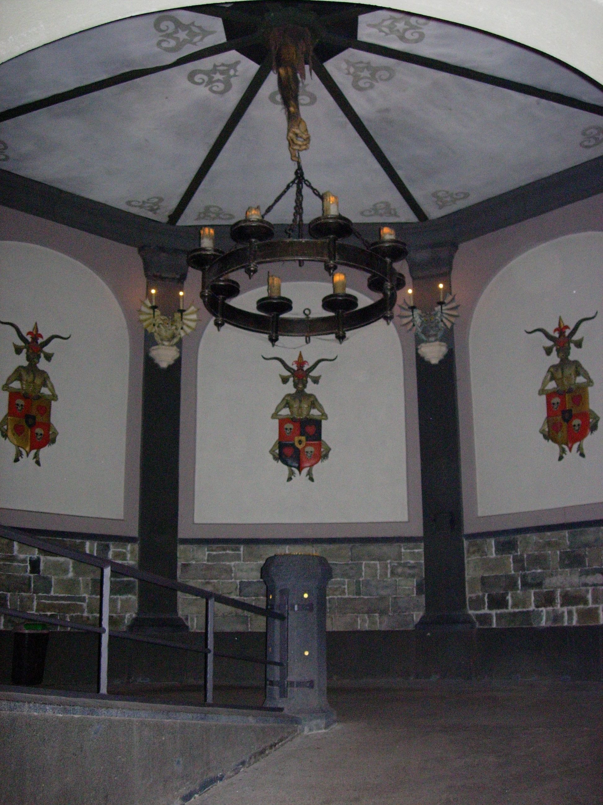 Lustre Spookslot